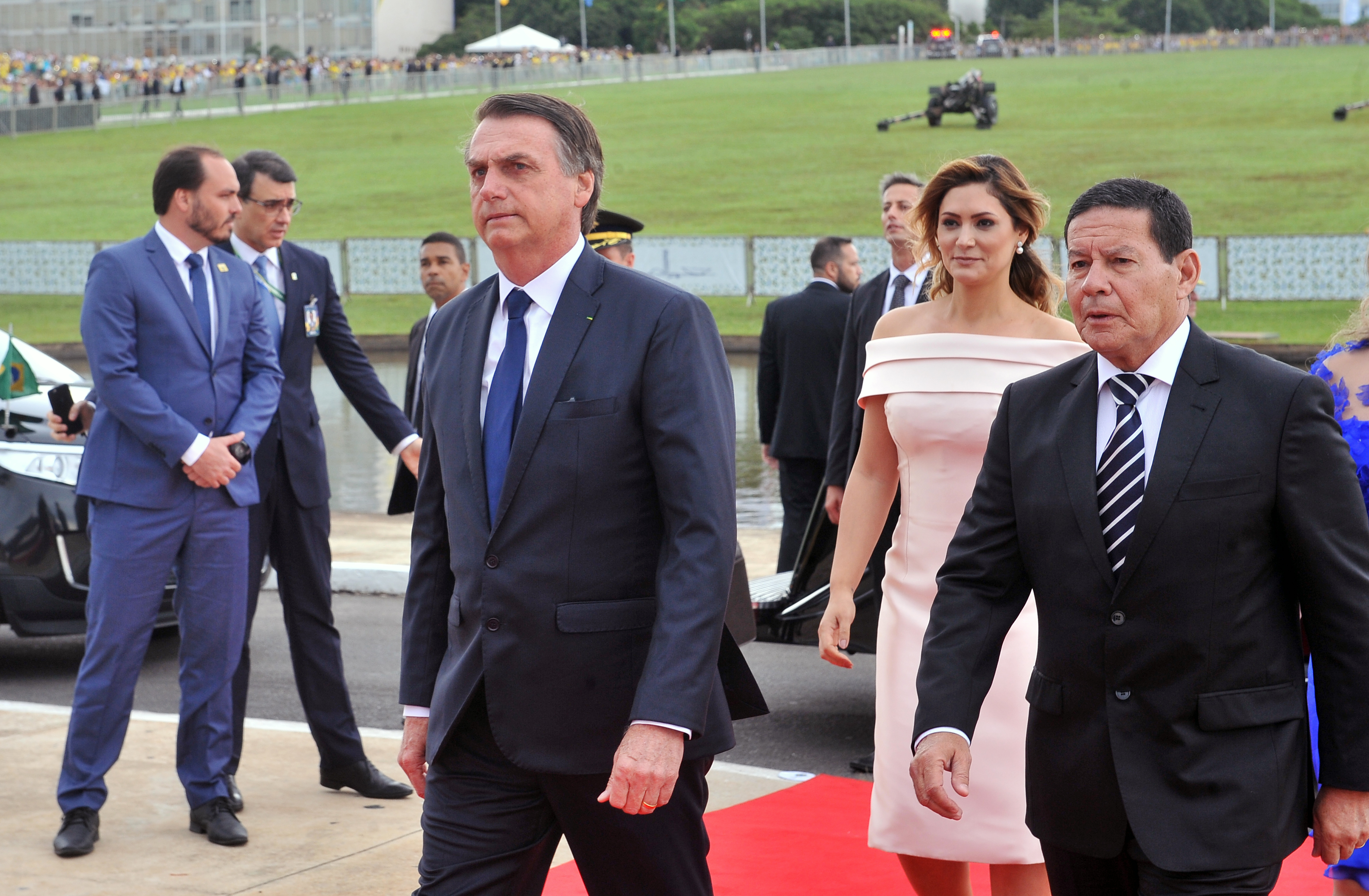 Chegada do presidente eleito, Jair Bolsonaro, para a cerimônia de posse